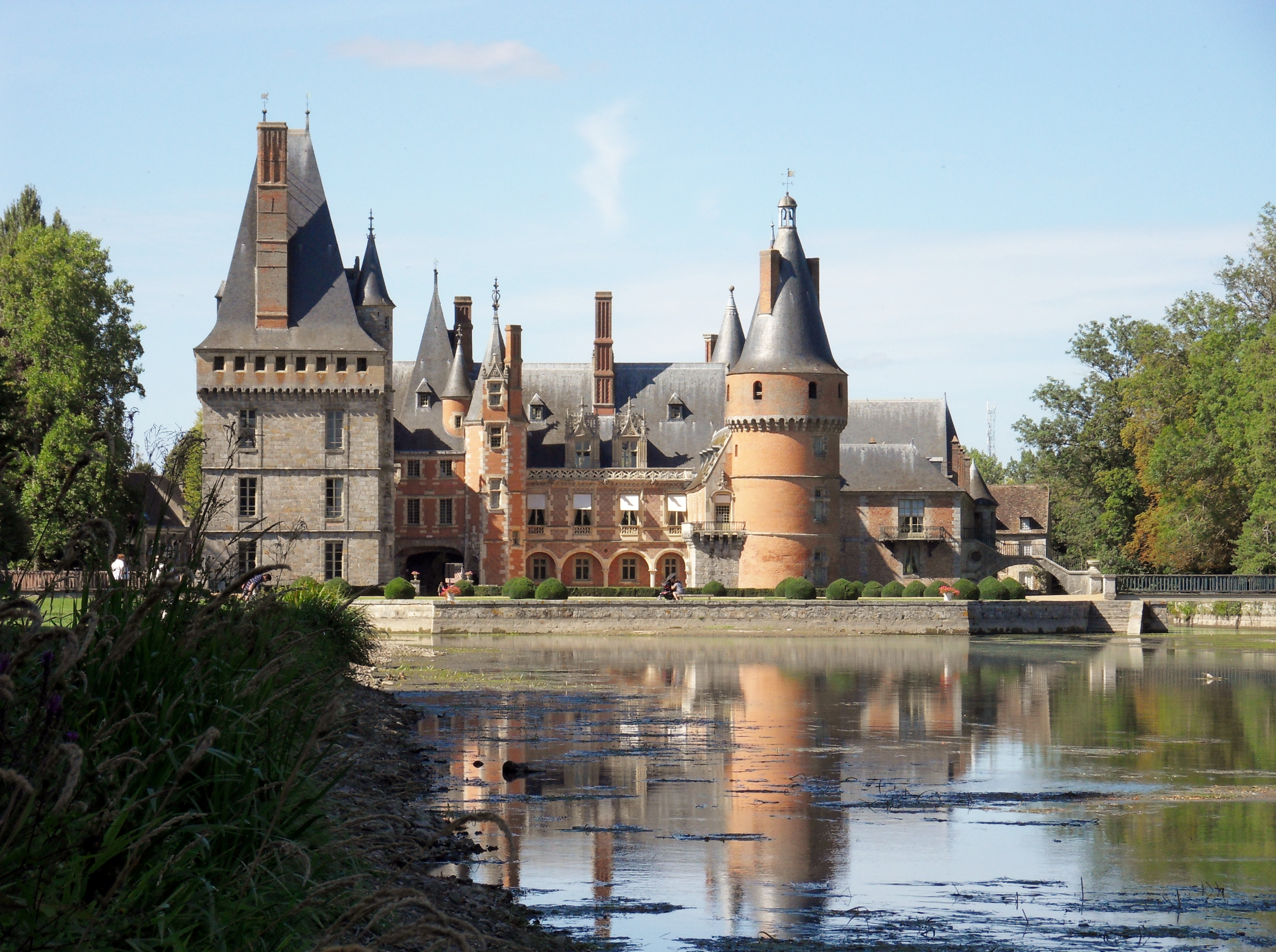 Situé en Eure-et-Loir, ce fut la demeure de la Marquise de Maintenon sous le règne de Louis XIV.